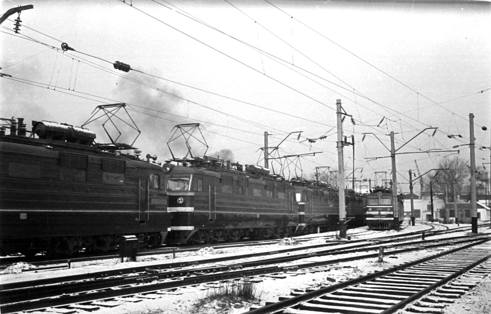 Electric locomotive VL60